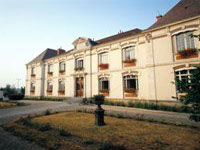 Vue extérieure du Bureau interprofessionnel des vins de Bourgogne